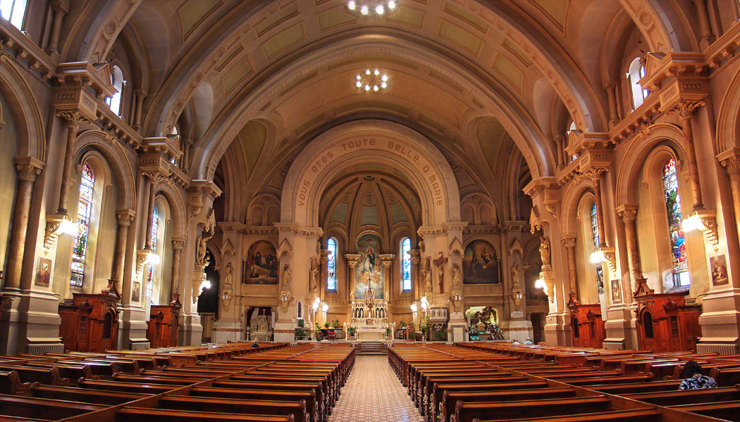 Église Immaculée-Conception, Montréal, Québec, Canada.